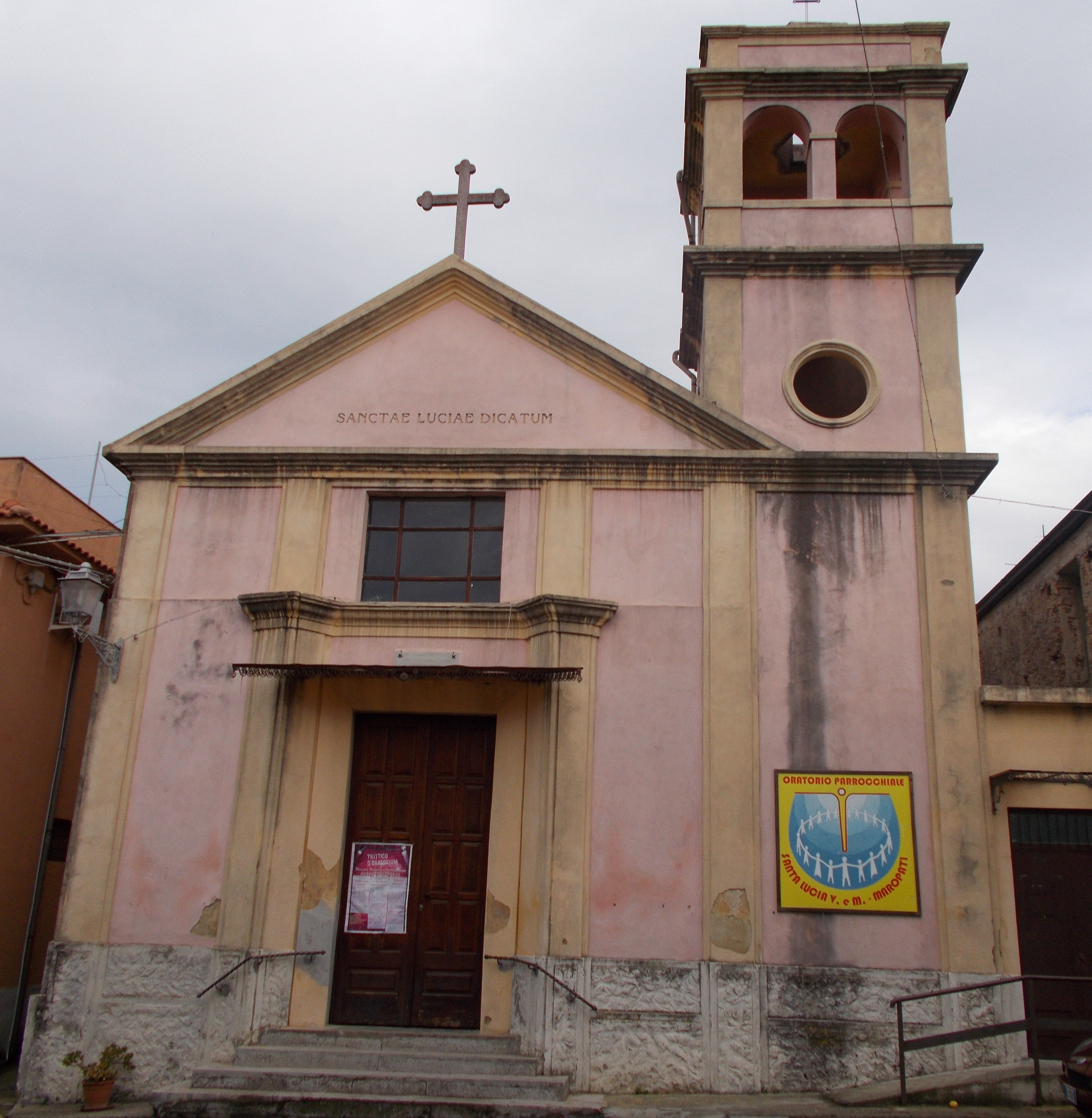 Chiesa di Santa Lucia, Maropati R.C..